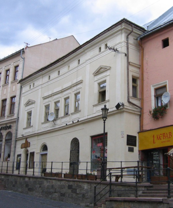 Banská Štiavnica, prvá banská škola v Európe